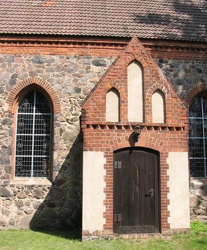 Kirche Gröben, Brandenburg. Ehemaliger Südeingang. Selbst fotografiert, August 2004 GNU FDL